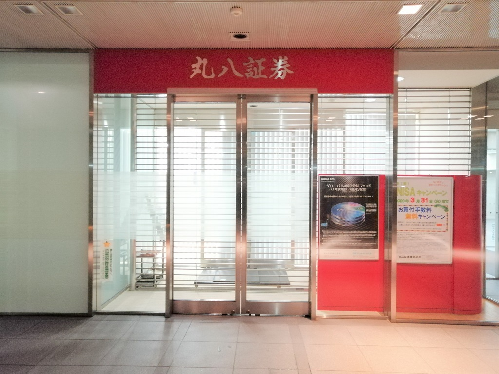 丸八証券 本社（名古屋市 新栄町）